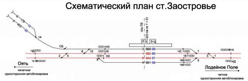 ст. Заостровье